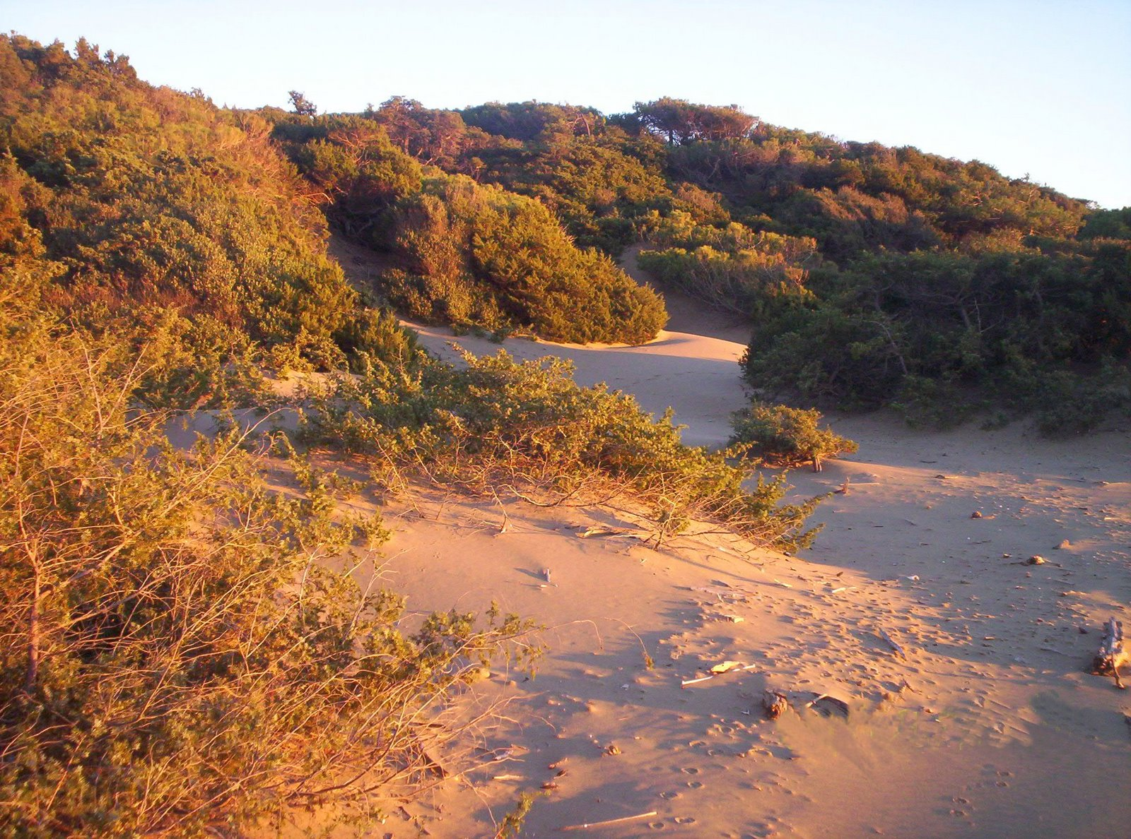 Fotografia del Parco